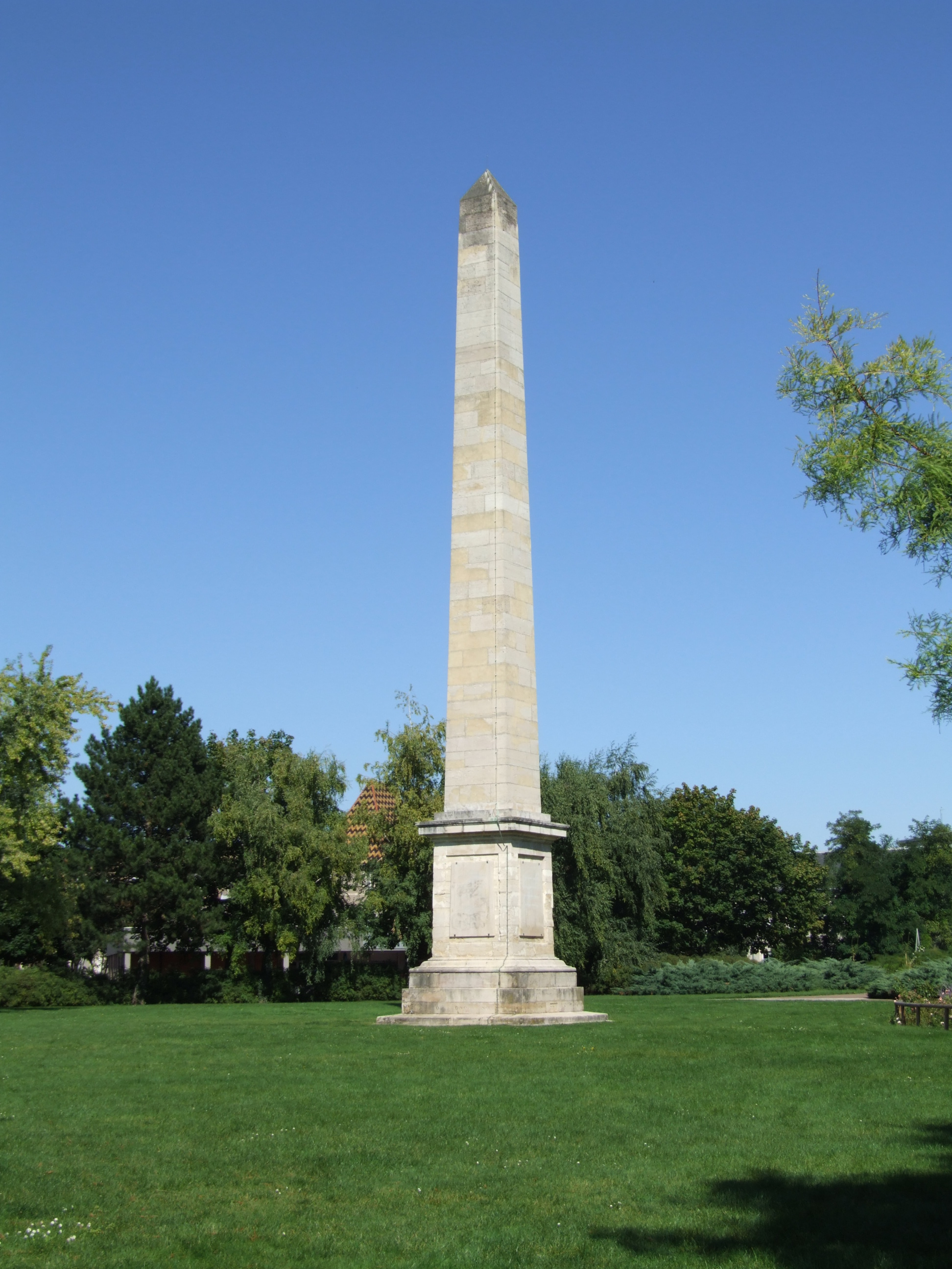 Dijon, Côte-d'Or, Bourgogne, FRANCE